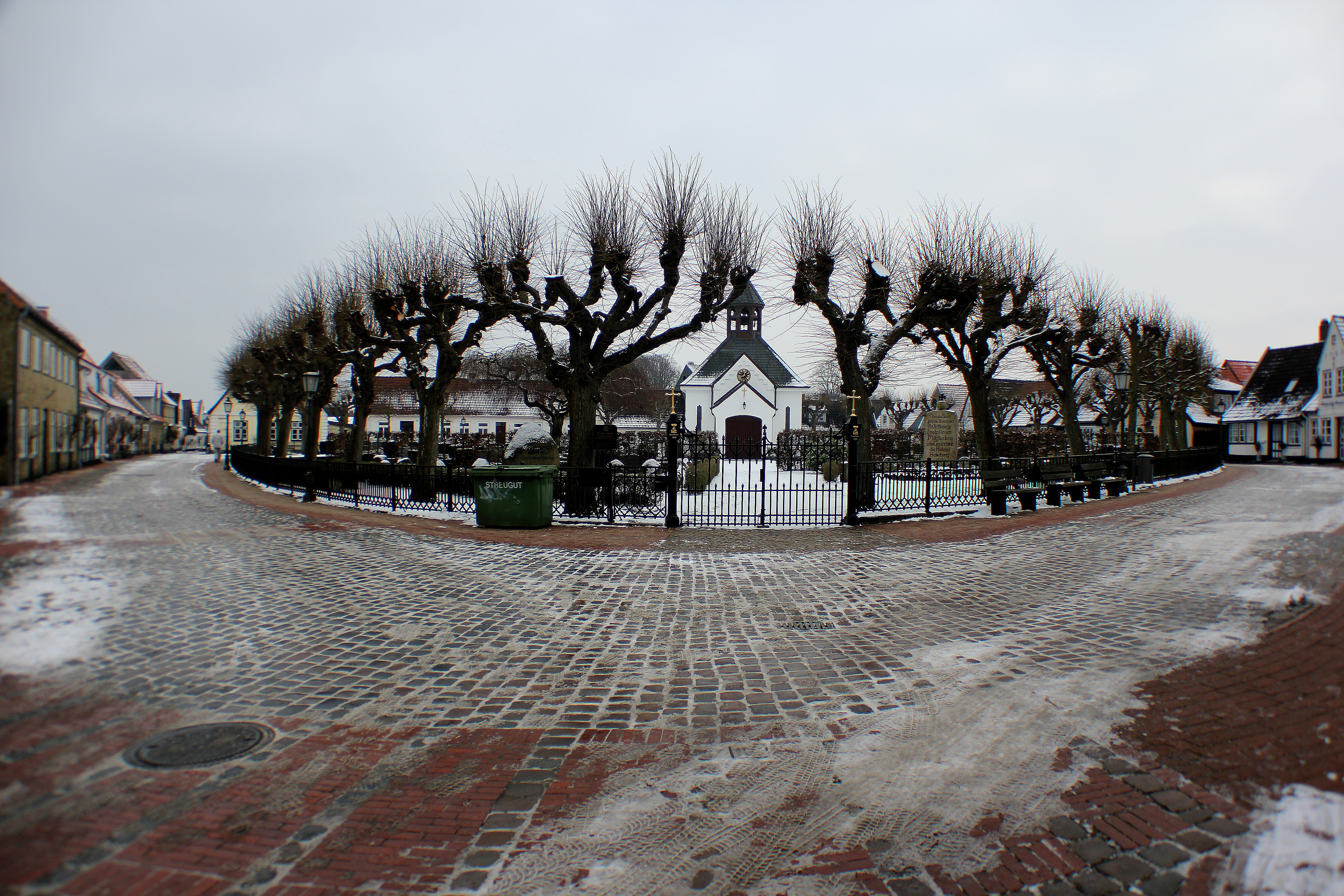 Holm (Schleswig) im Schnee